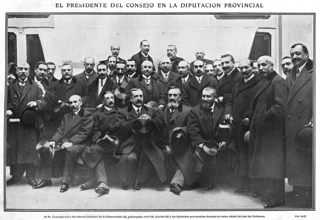 . Fot. Goñi